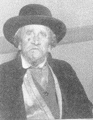 רבי מרדכי חיים קסטילניץ מסלונים